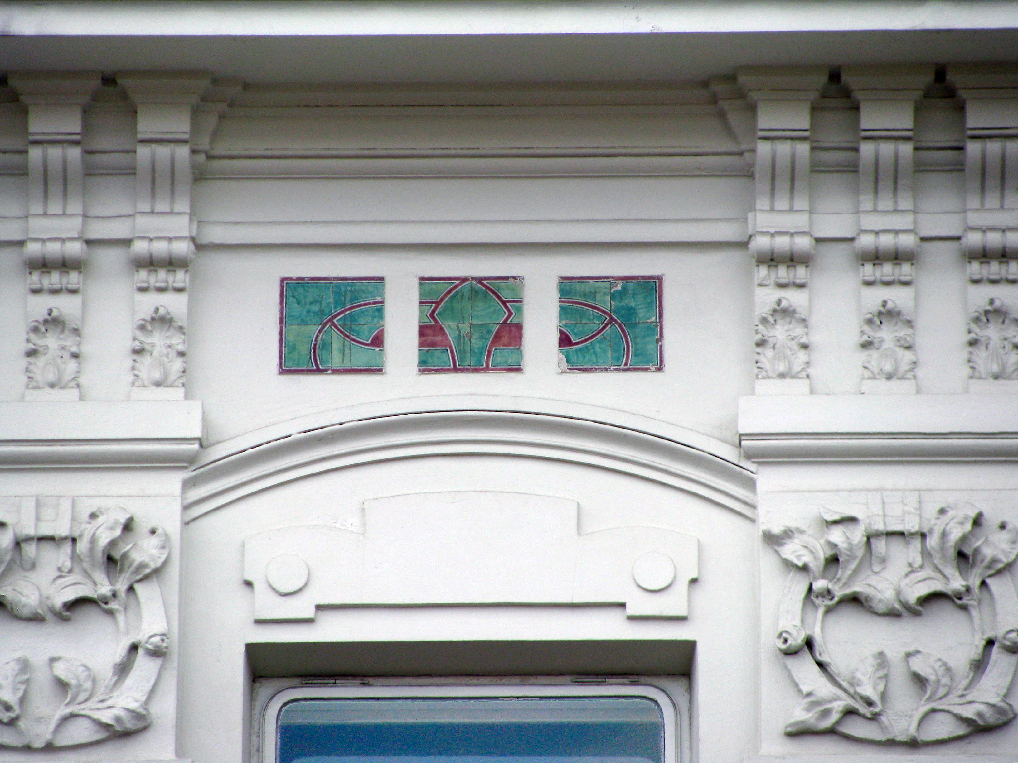 Будинок по вулиці Богомольця, 6 (Львів). Фрагмент. Запроектований архітектурно-будівничим бюро Івана Левинського.